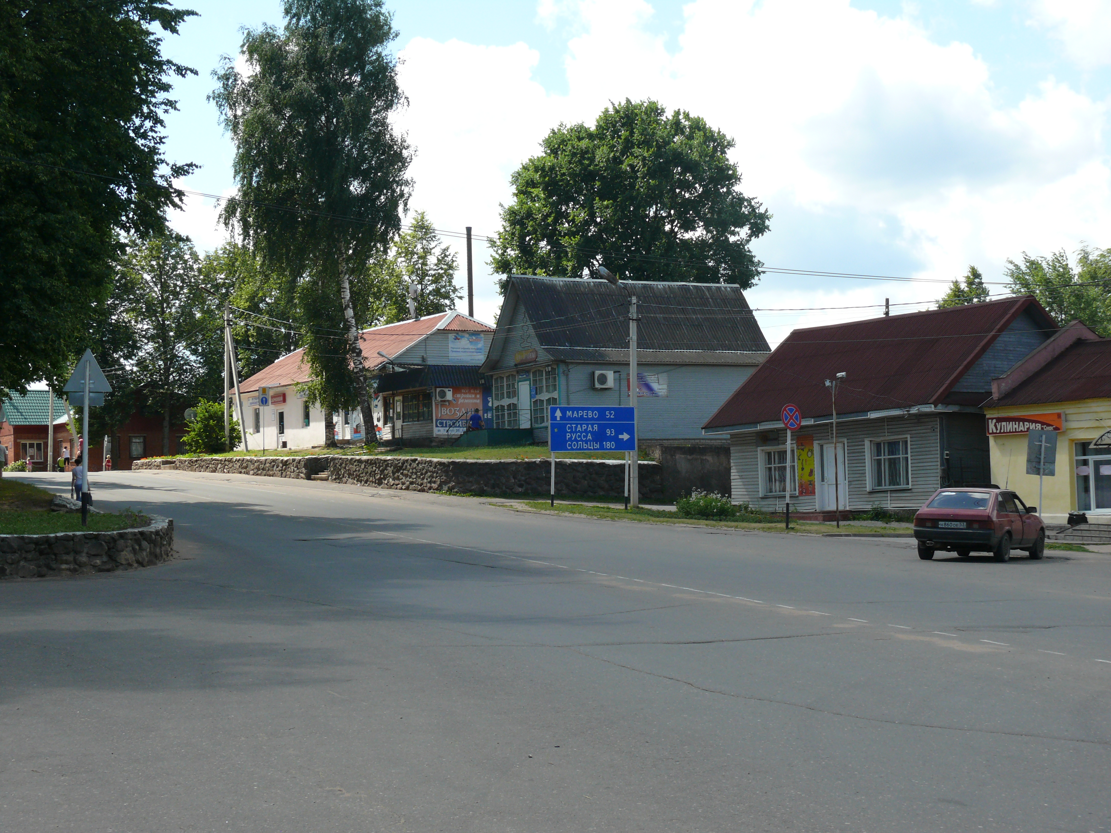 Посёлок Демянск, Новгородская область